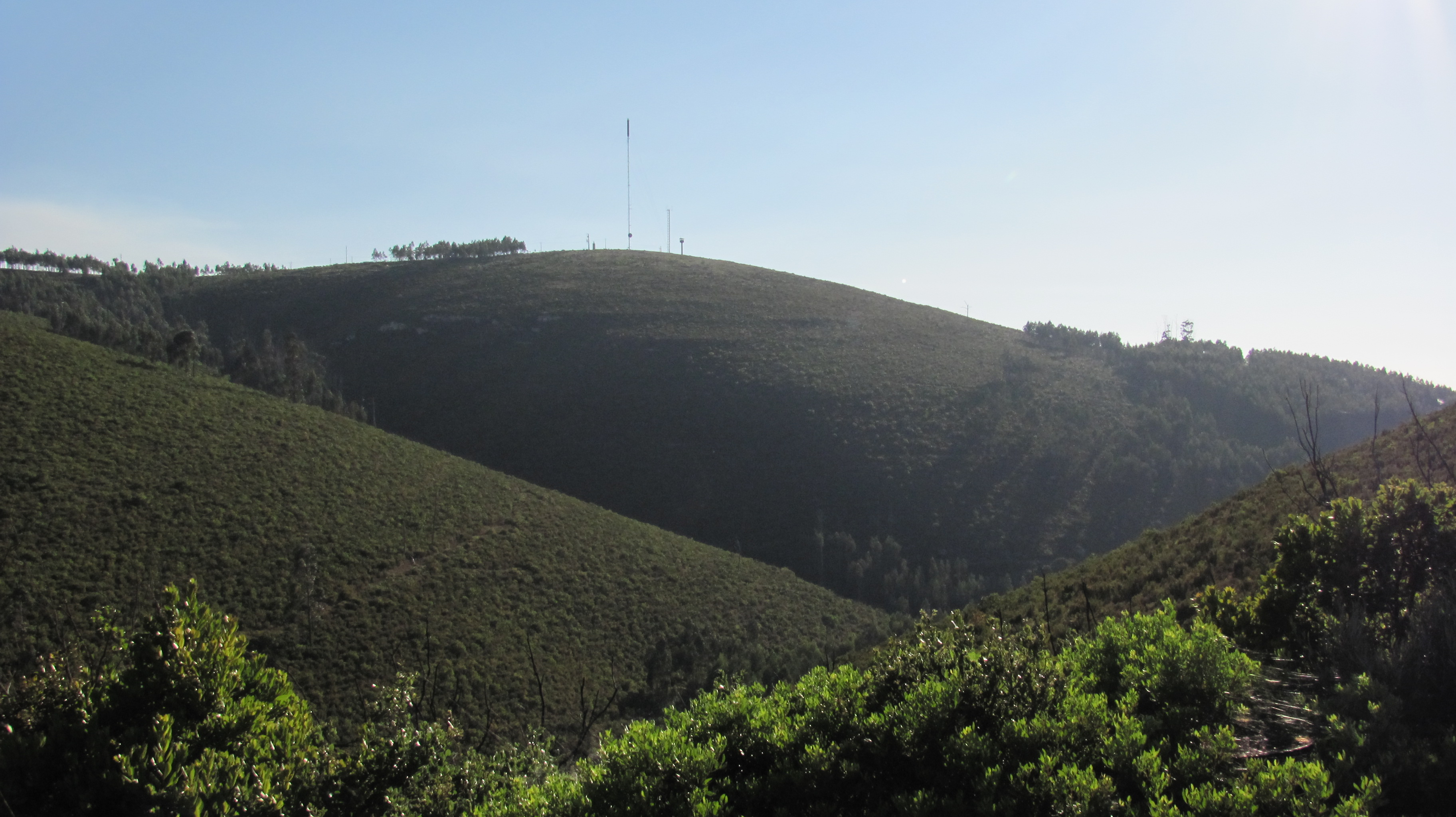 Photographie des Monts, près du Cabeço da Maunça, massif de la Dame du Mont, Cortes, Leiria.